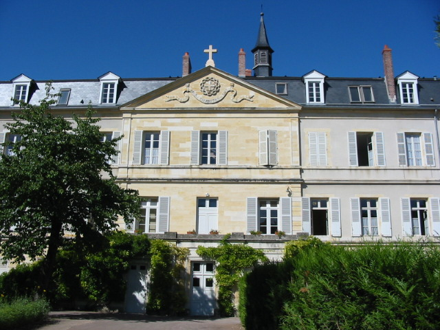 Le fronton à l'entrée de l'espace Saint-Gildard, où vécut Sainte-Bernadette (Bernadette Soubirous), à Nevers.